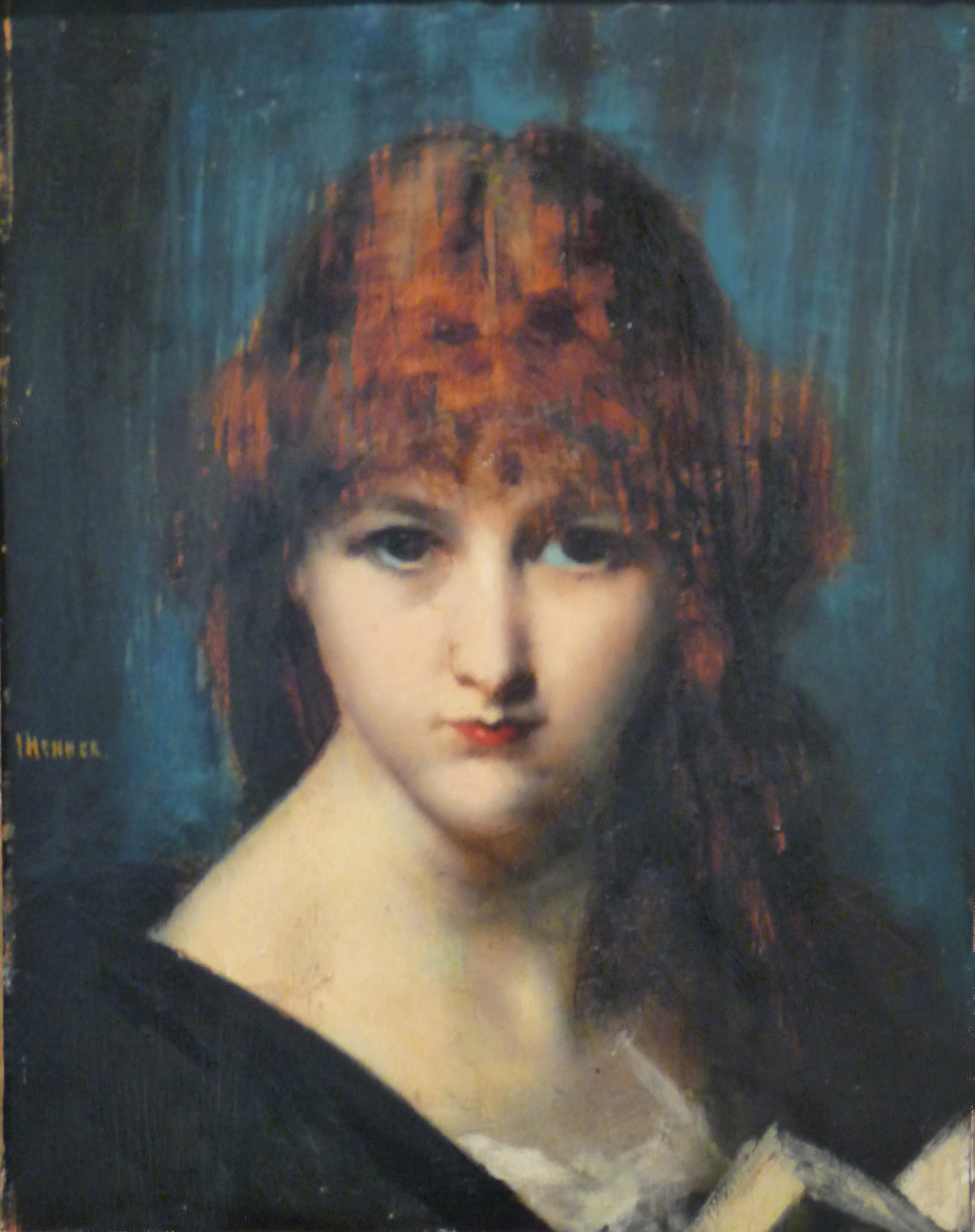 Jean-Jacques Henner, Portrait de femme, huile sur bois, Musée des beaux-arts de Mulhouse